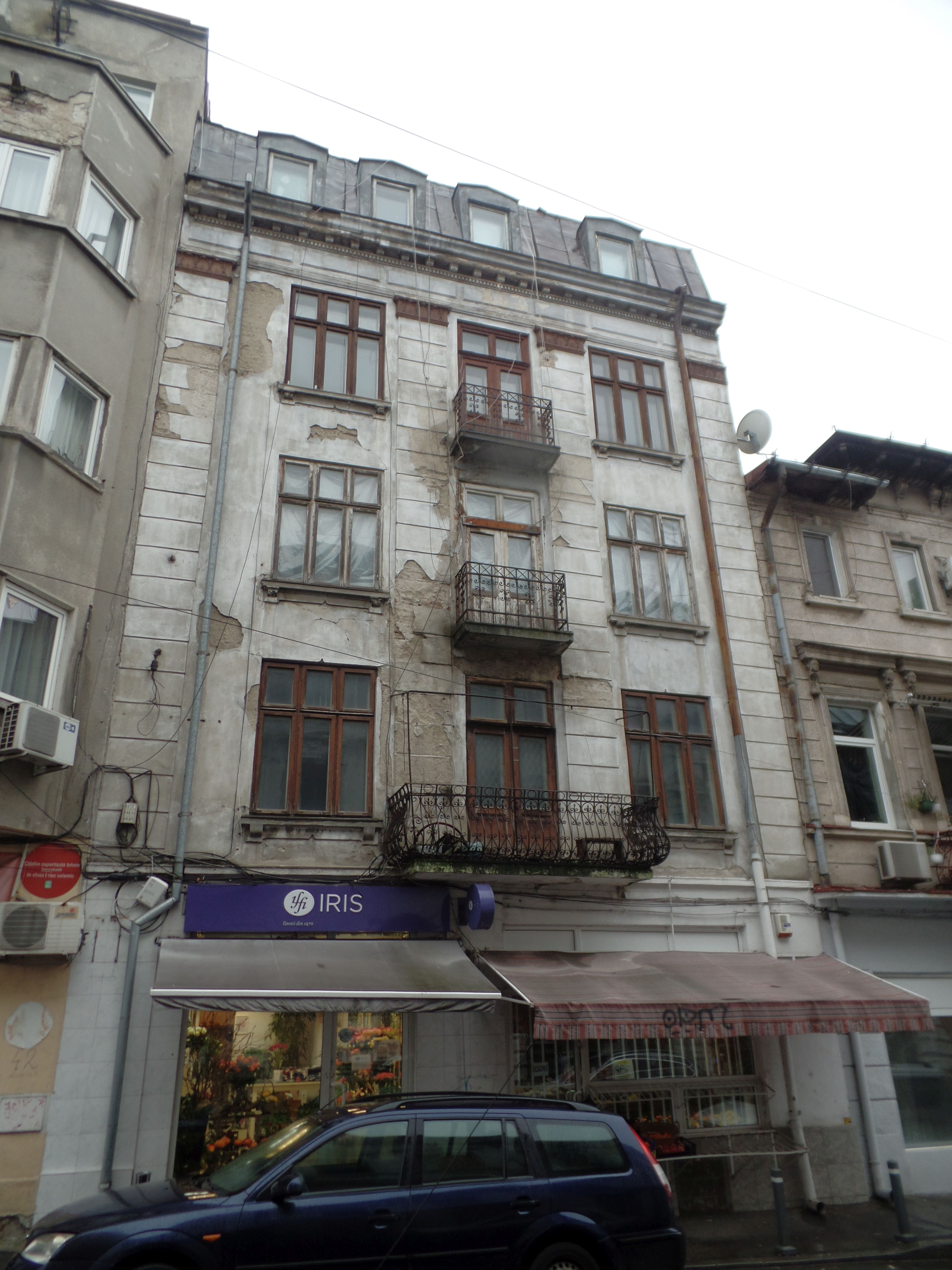 Casă D+P+3E+M